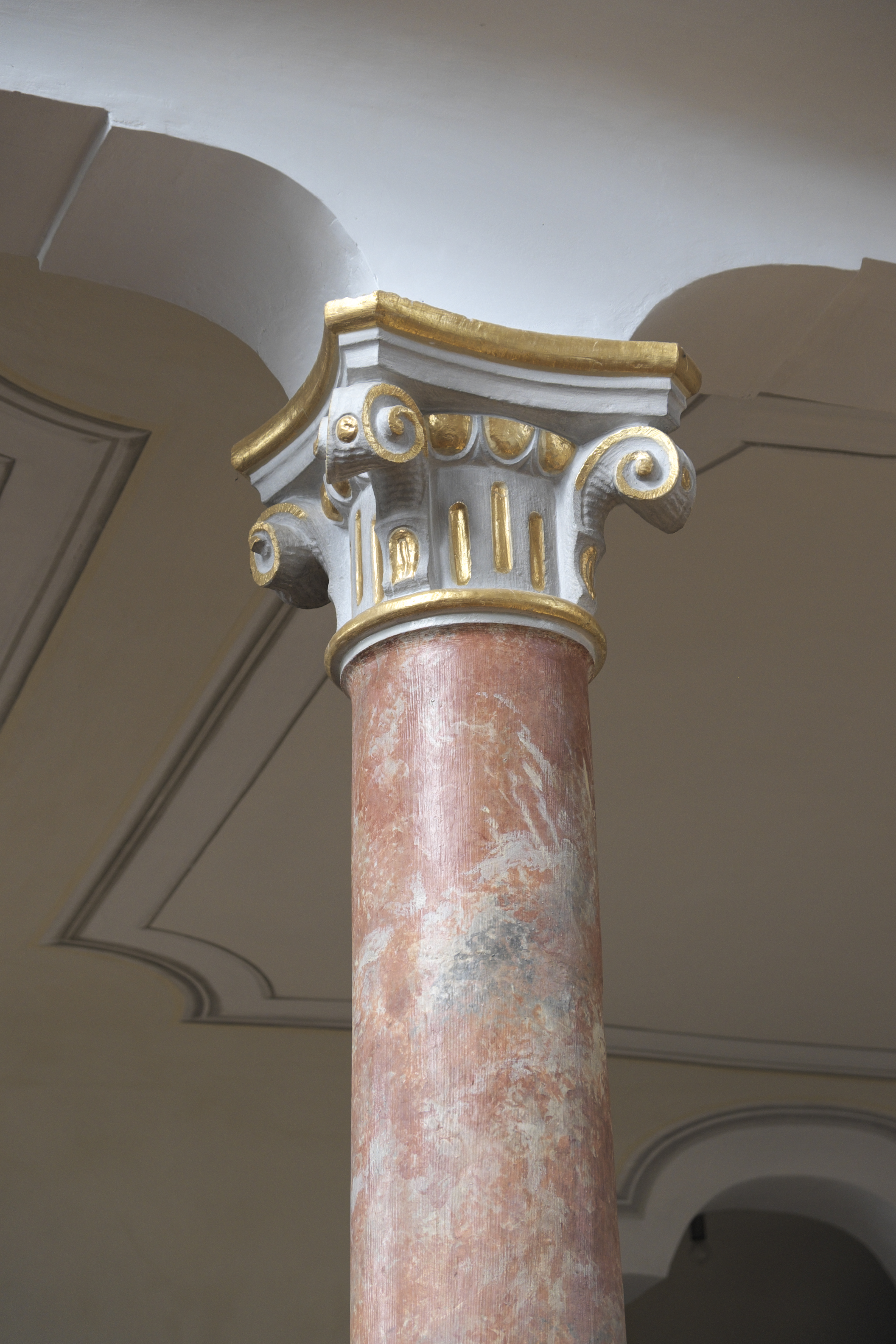 Katholische Pfarrkirche St. Johannes Baptist in Dischingen (Landkreis Heidenheim/Baden-Württemberg), Säule unter der Doppelempore mit Volutenkapitell